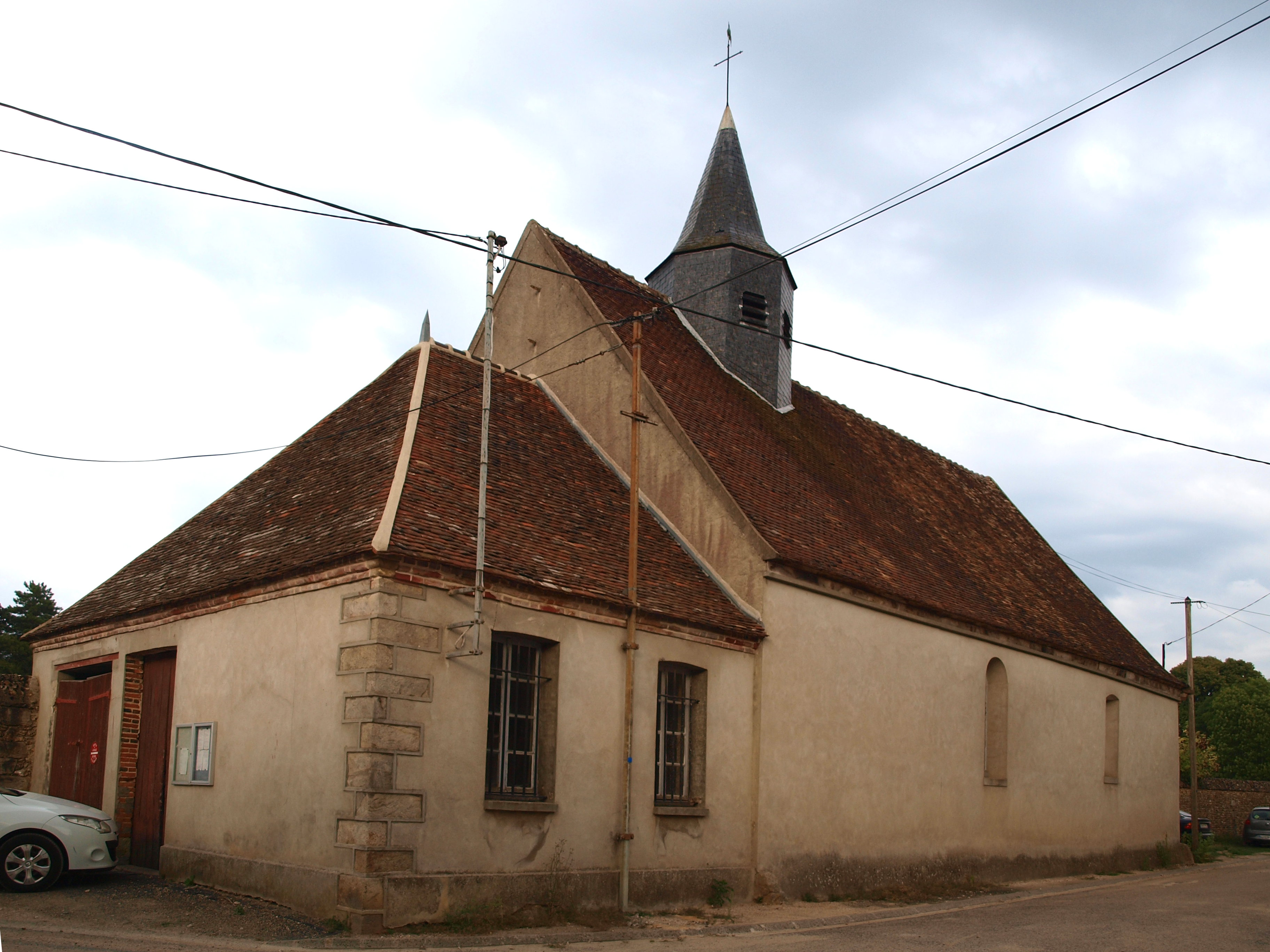 Passy (Yonne, France) ; l'église.